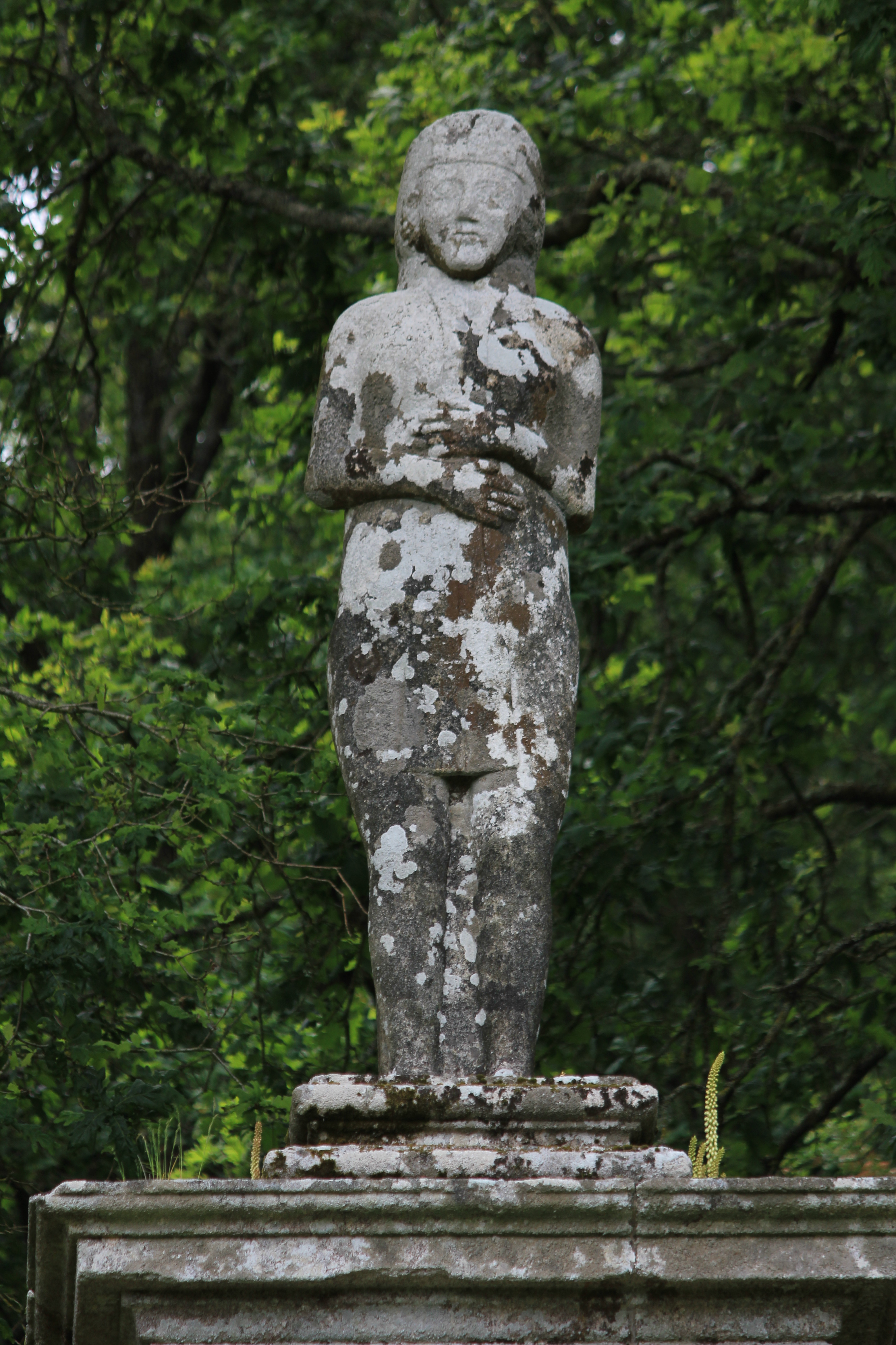 Vénus de Quinipily